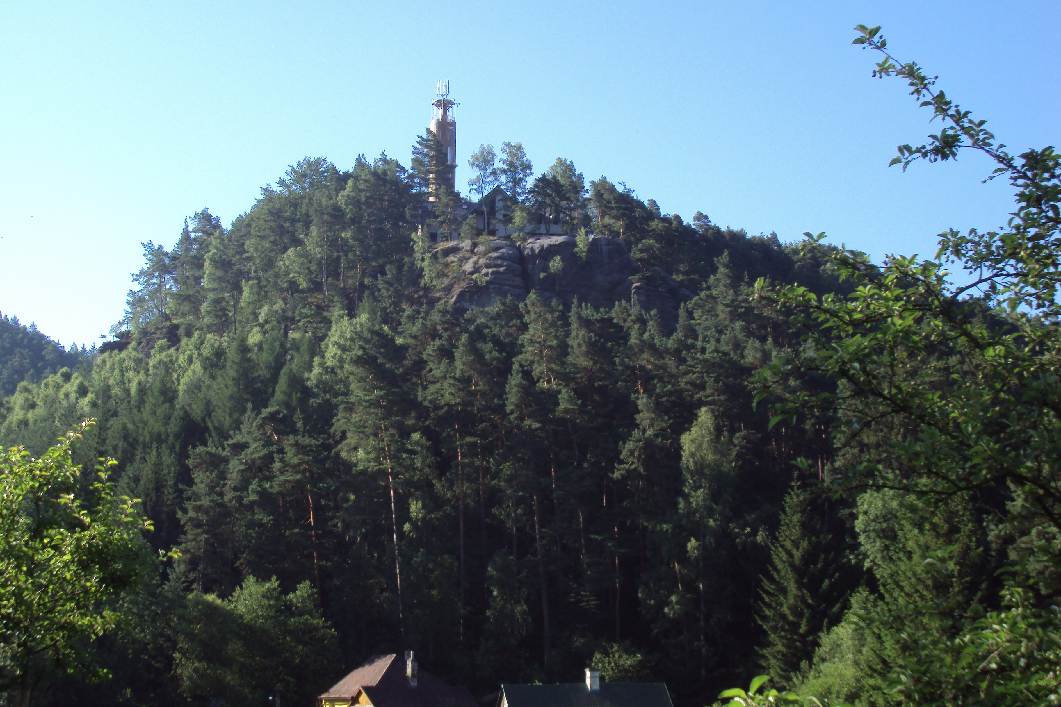 Nově stavěná rozhledna s restaurací nad Sloupem zespodu z obce